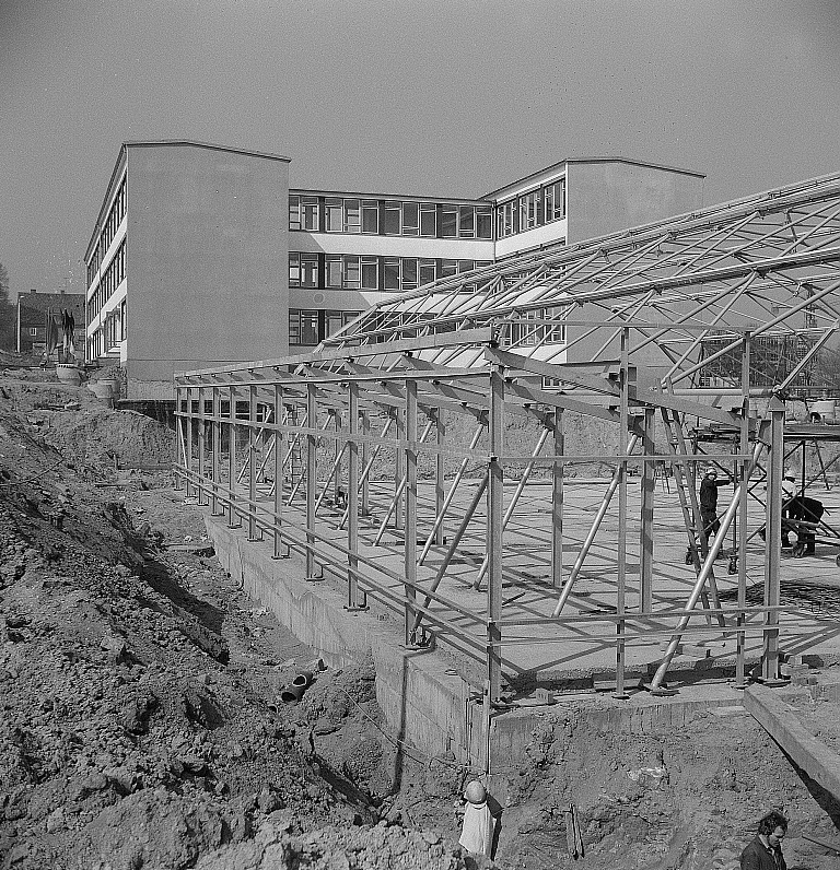 Original image description from the Deutsche FotothekDresden-Zschertnitz. Schulen 110. und 111. POS, später Theodor Körner und Gottfried Semper, Bau der Turnhalle